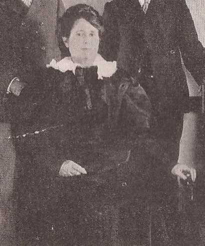 La primer persona blanca en nacer en Chubut, descendiente de galeses